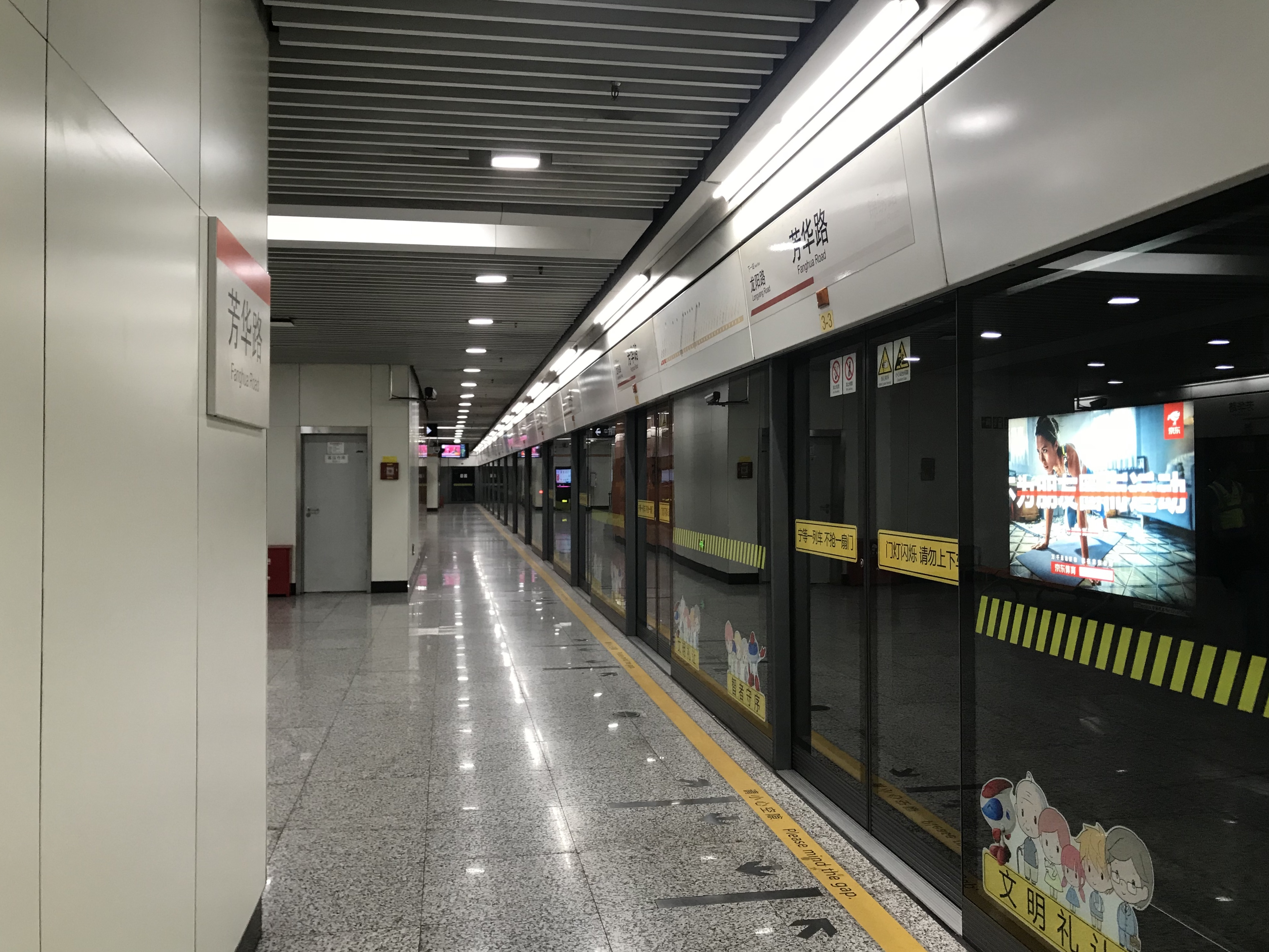 芳華路駅のホーム